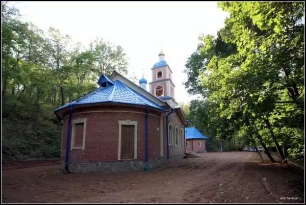 Храм на пещерах. Бузулук. На месте уничтоженного храма Бузулукского Спасо-Преображенского монастыря.